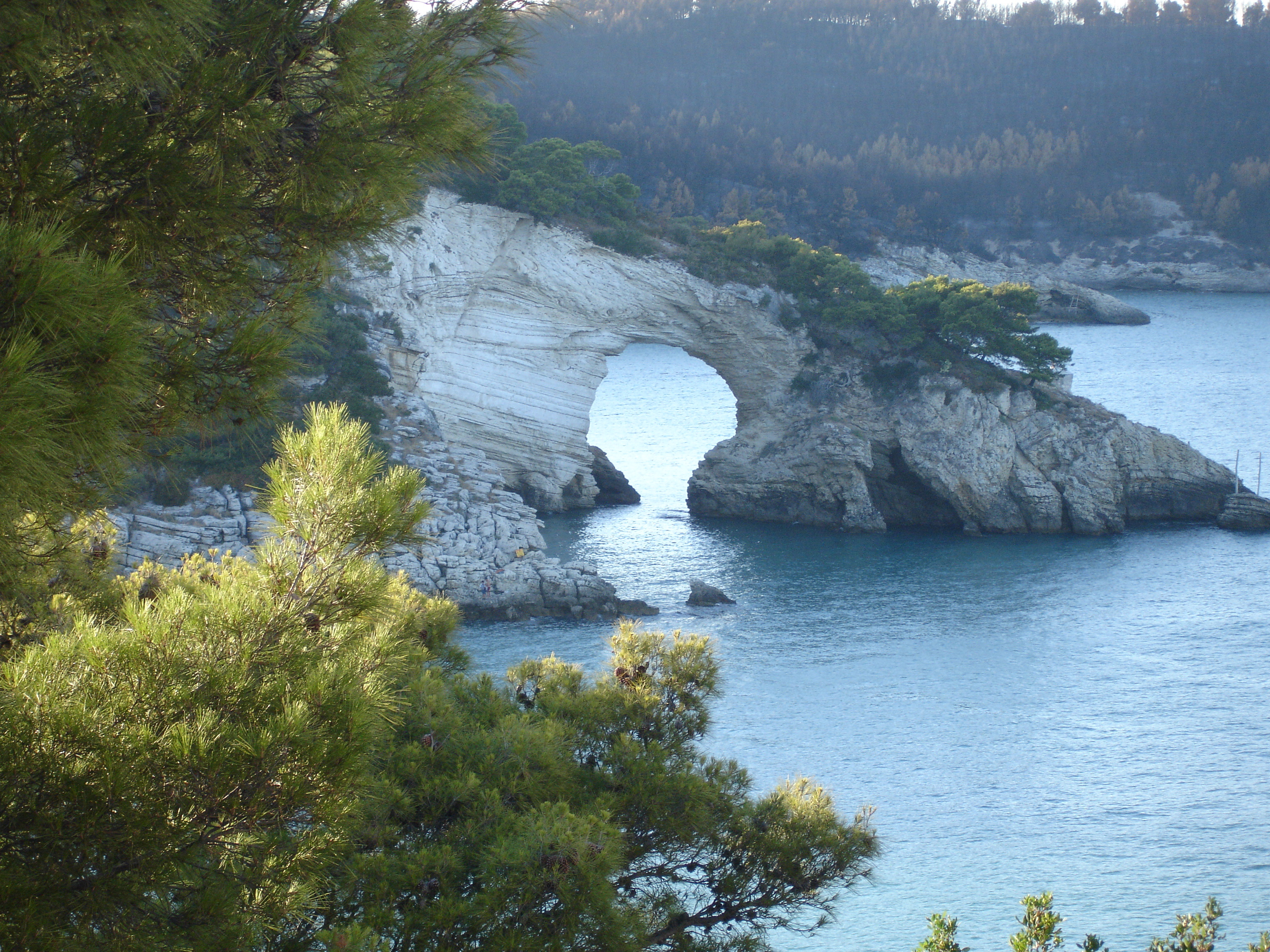 Architiello, Formazione calcarea (Lime, Kalk). Erosione